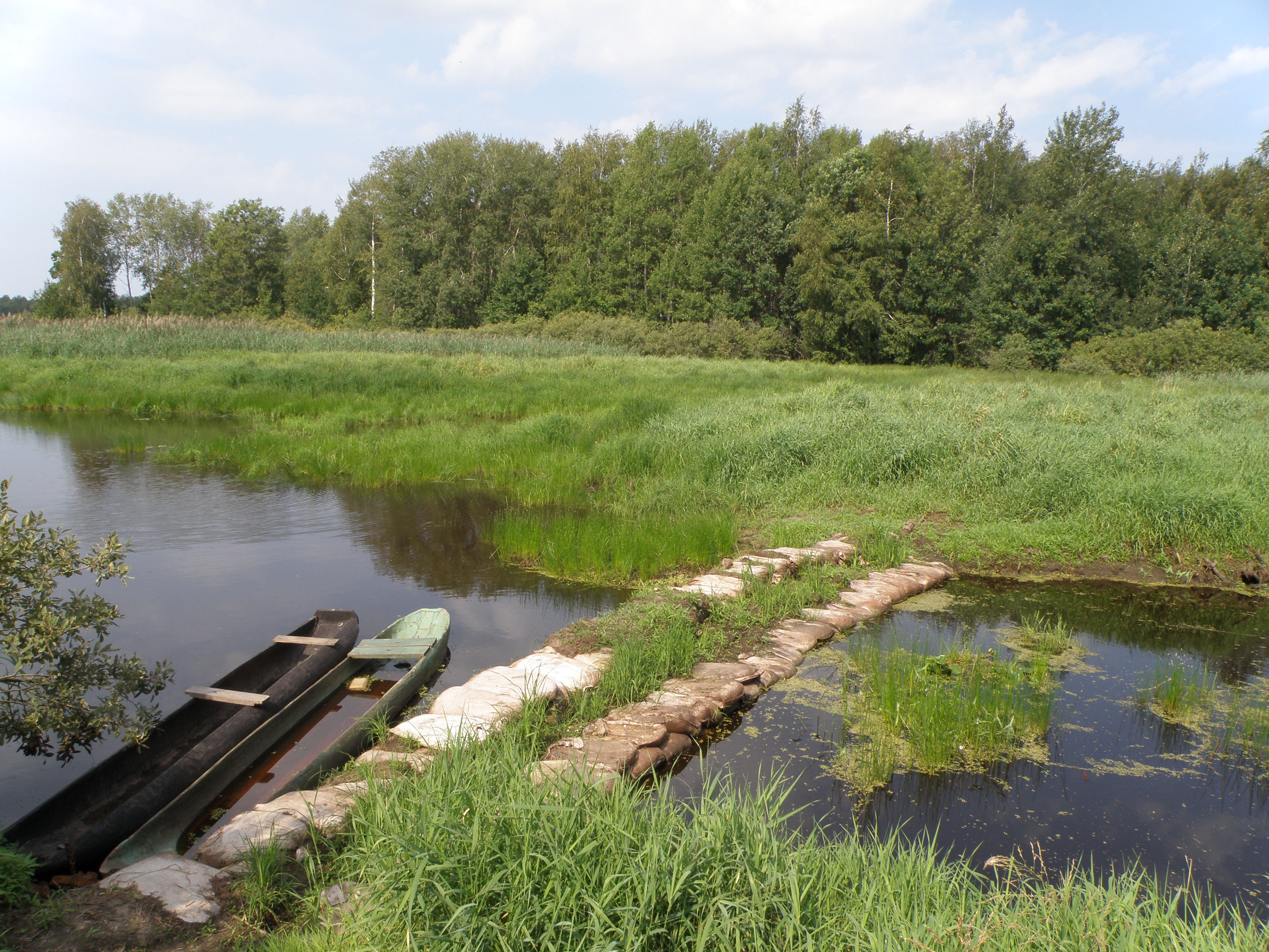 Выход Караслицы из Спуднинского оз., дамба из мешков с песком